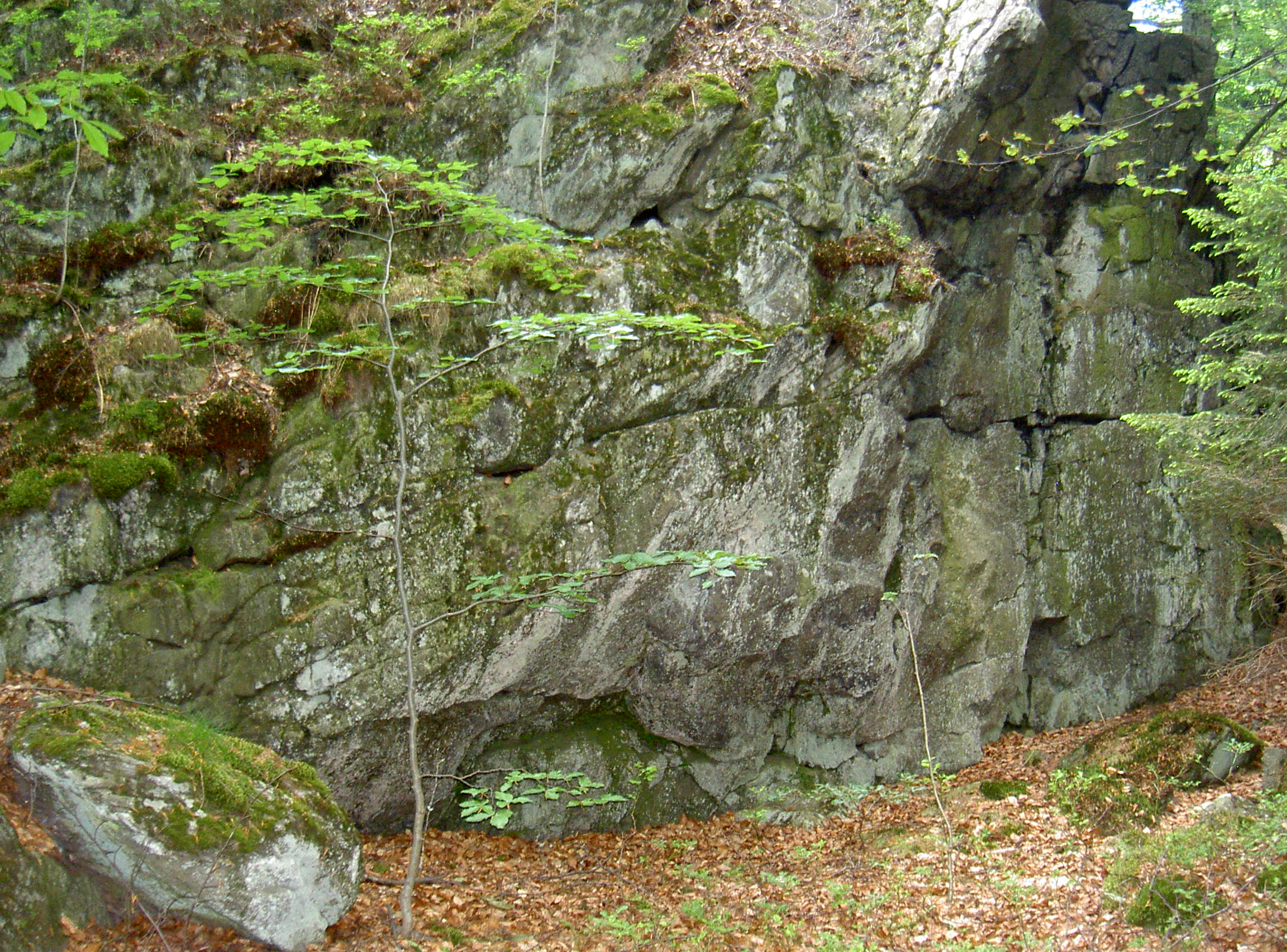 Weingartenfels